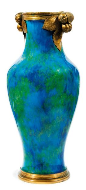 Vase Balustre par Paul Milet, Sèvres, France, début XXe siècle